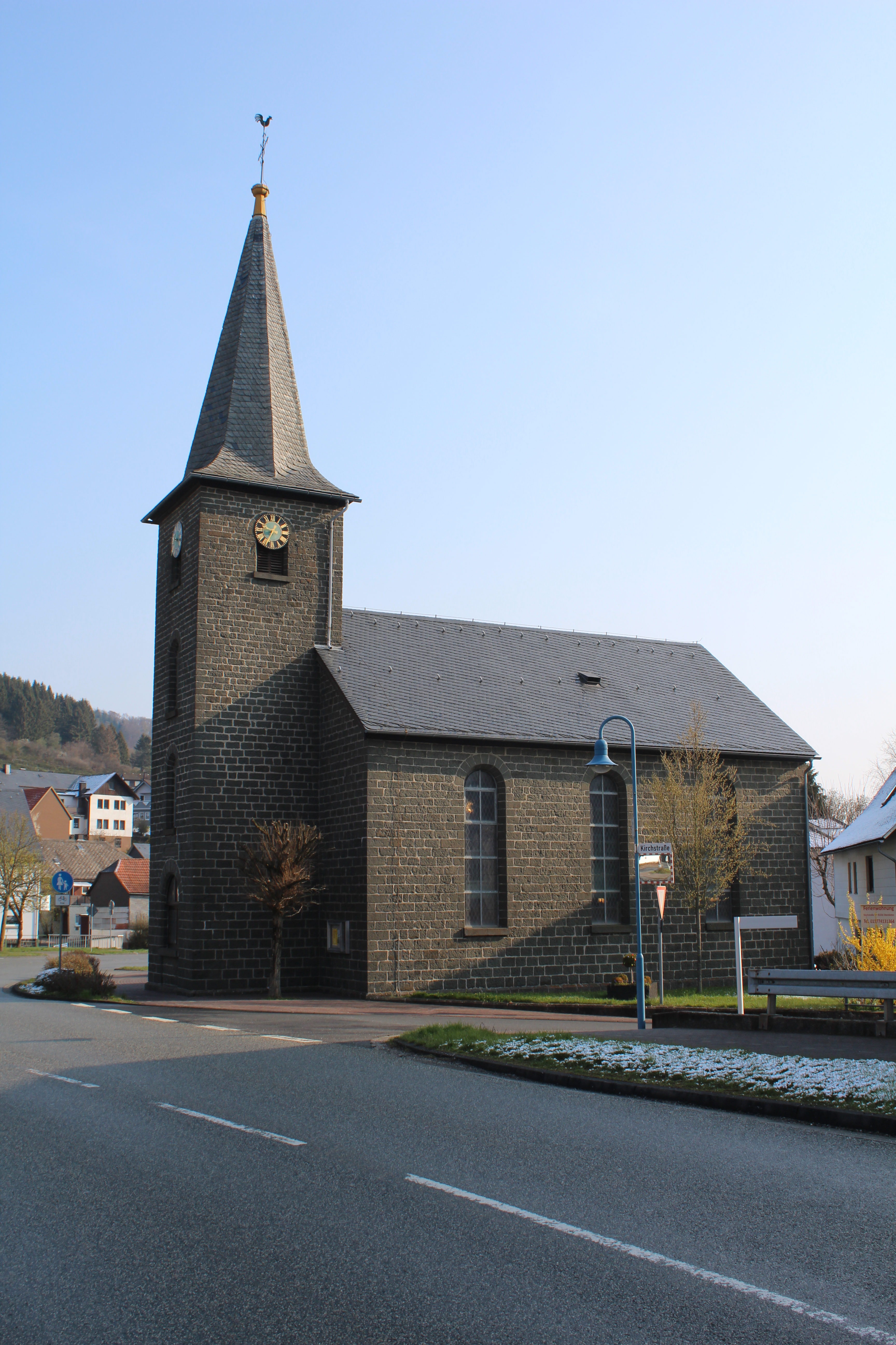 Evangelische Kirche Oberdieten, Breidenbach, Landkreis Marburg-Biedenkopf, Hessen, Deutschland